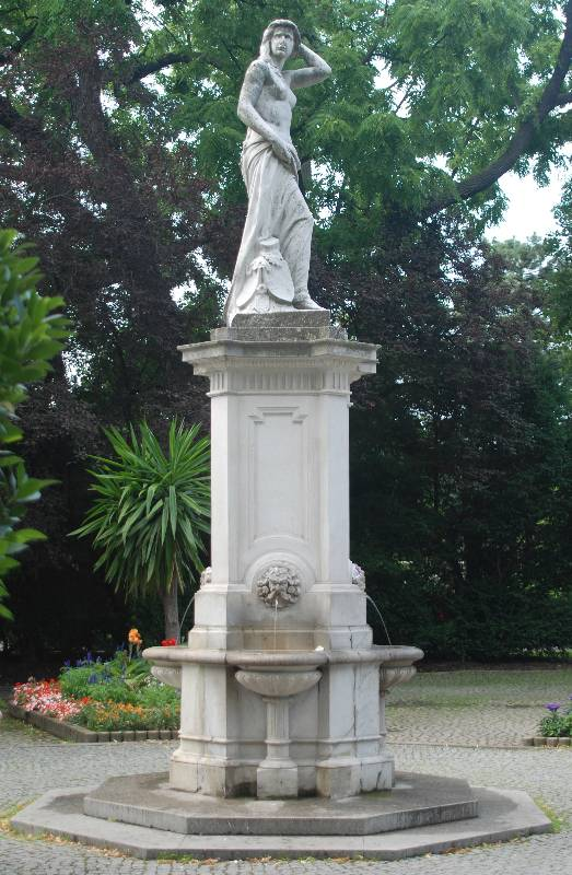 Der Donauweibchenbrunnen im Wiener Stadtpark ist der älteste figurale Schmuck dieser Anlage.